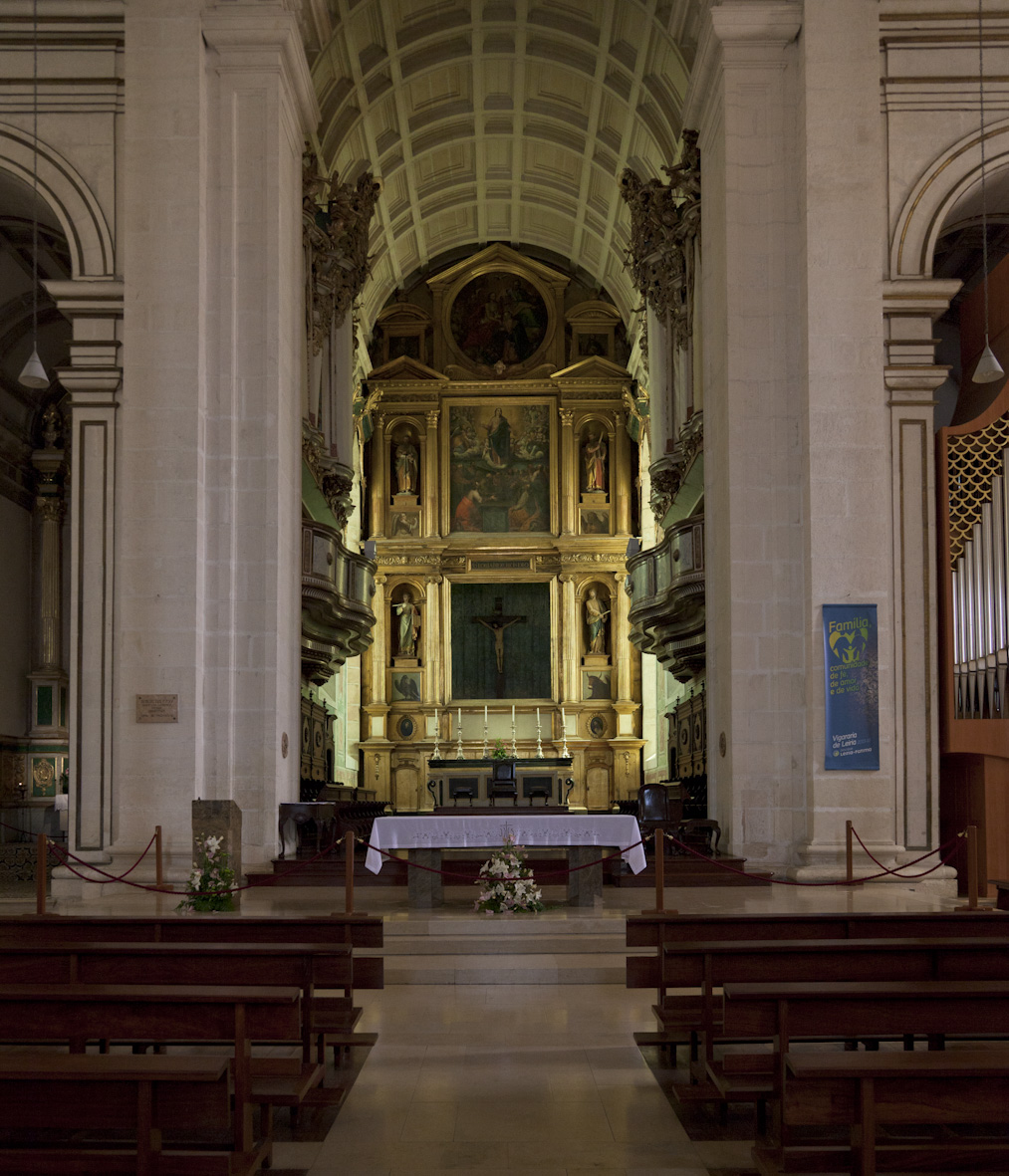 Sé de Leiria